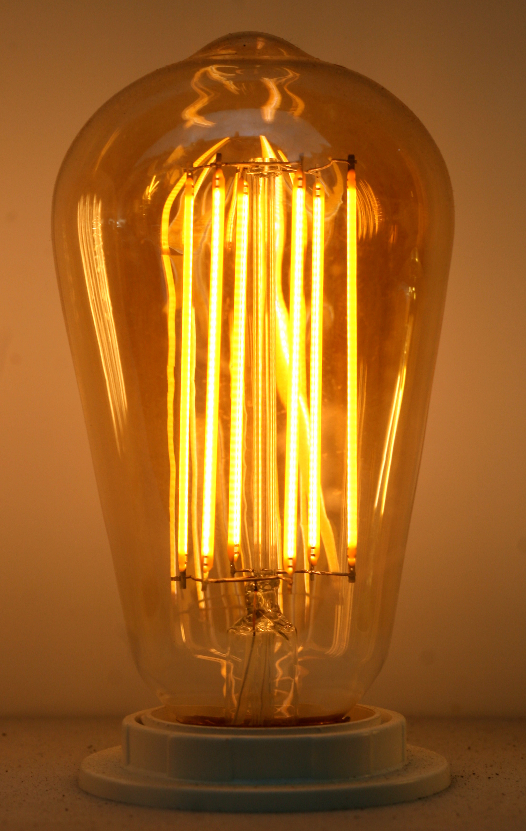 Ampoule - 2016